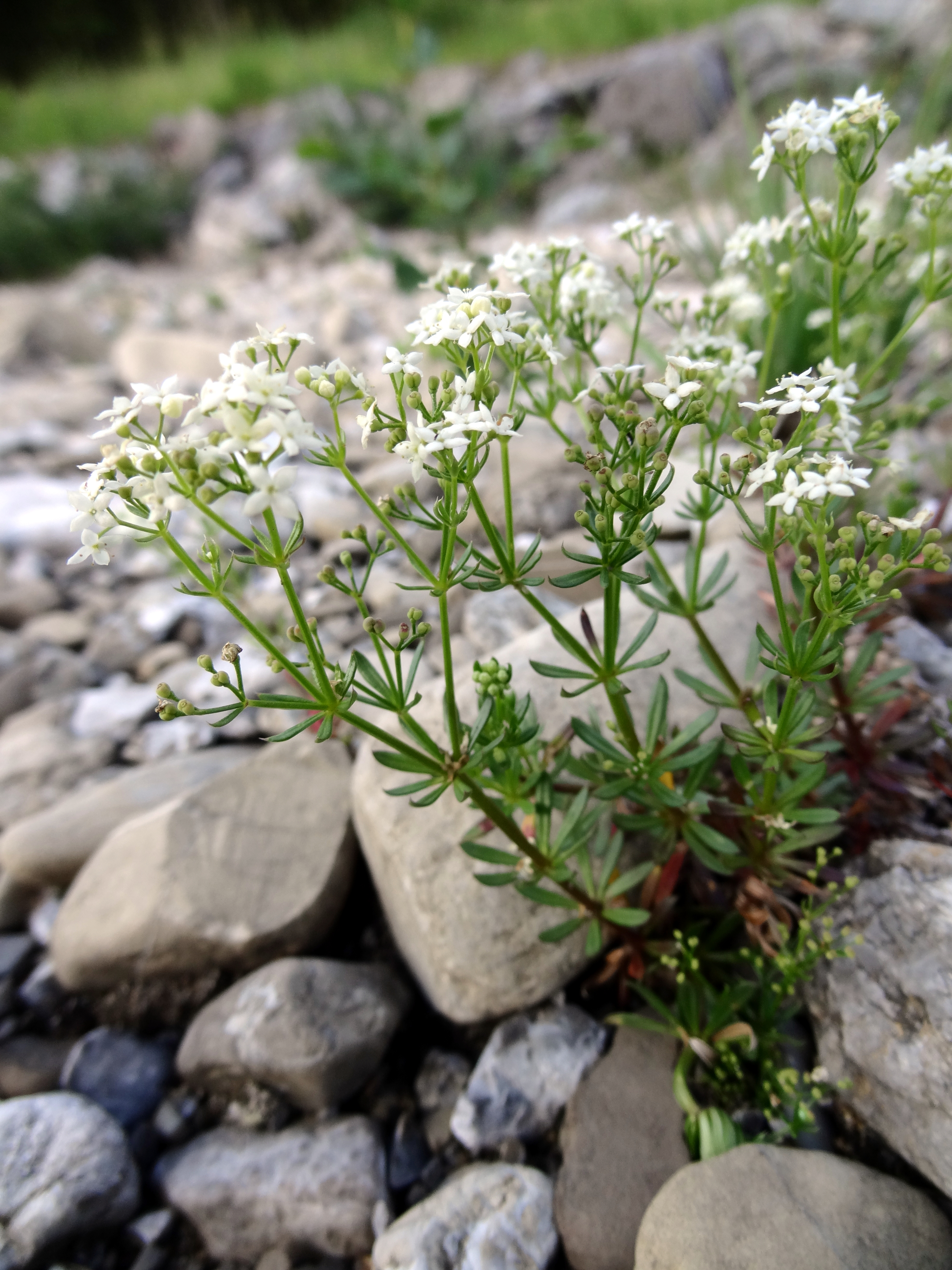 Rubiaceae, Deutschland, Bayern, Allgäu, Oberstdorf, Stillachtal, 900 m Photo: U.Schmidt, 23.VI.2012